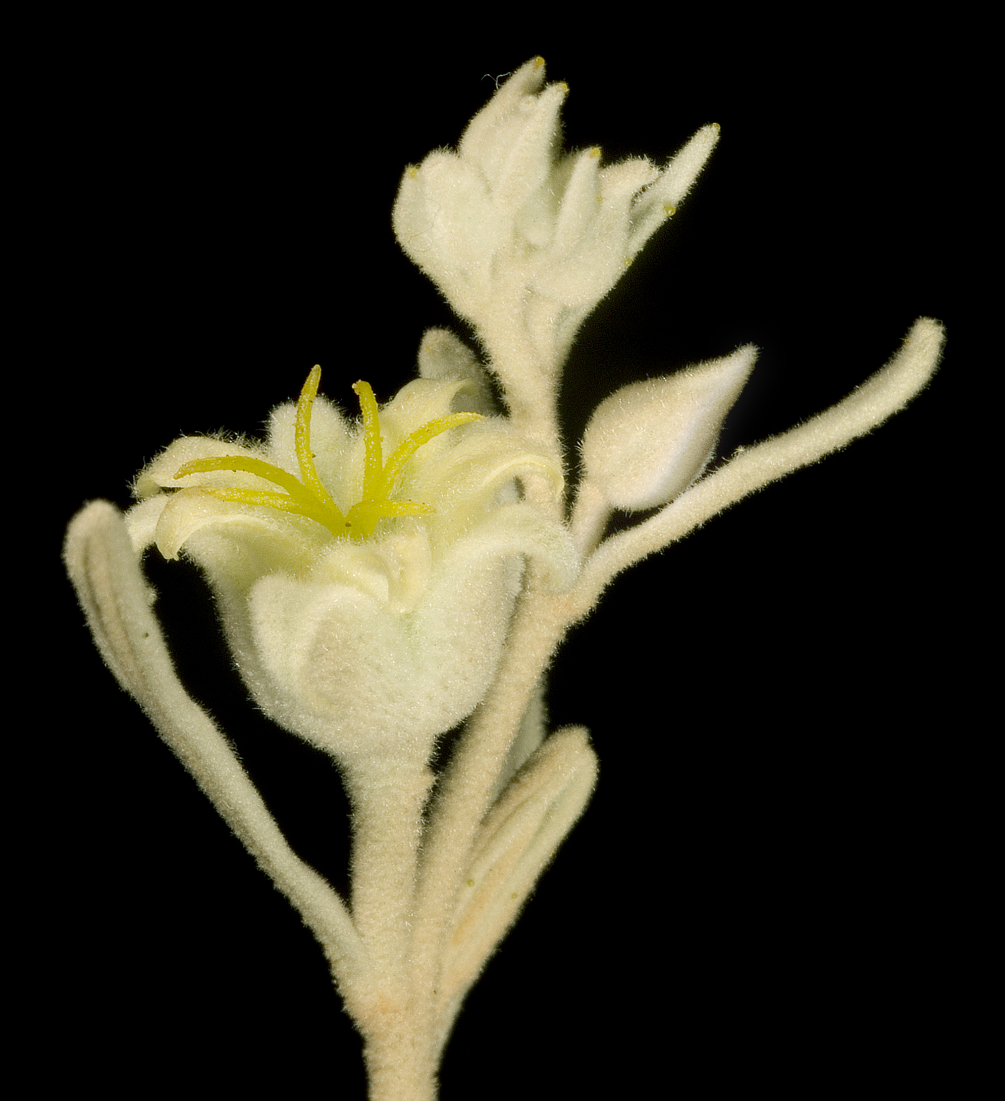 KRT3731